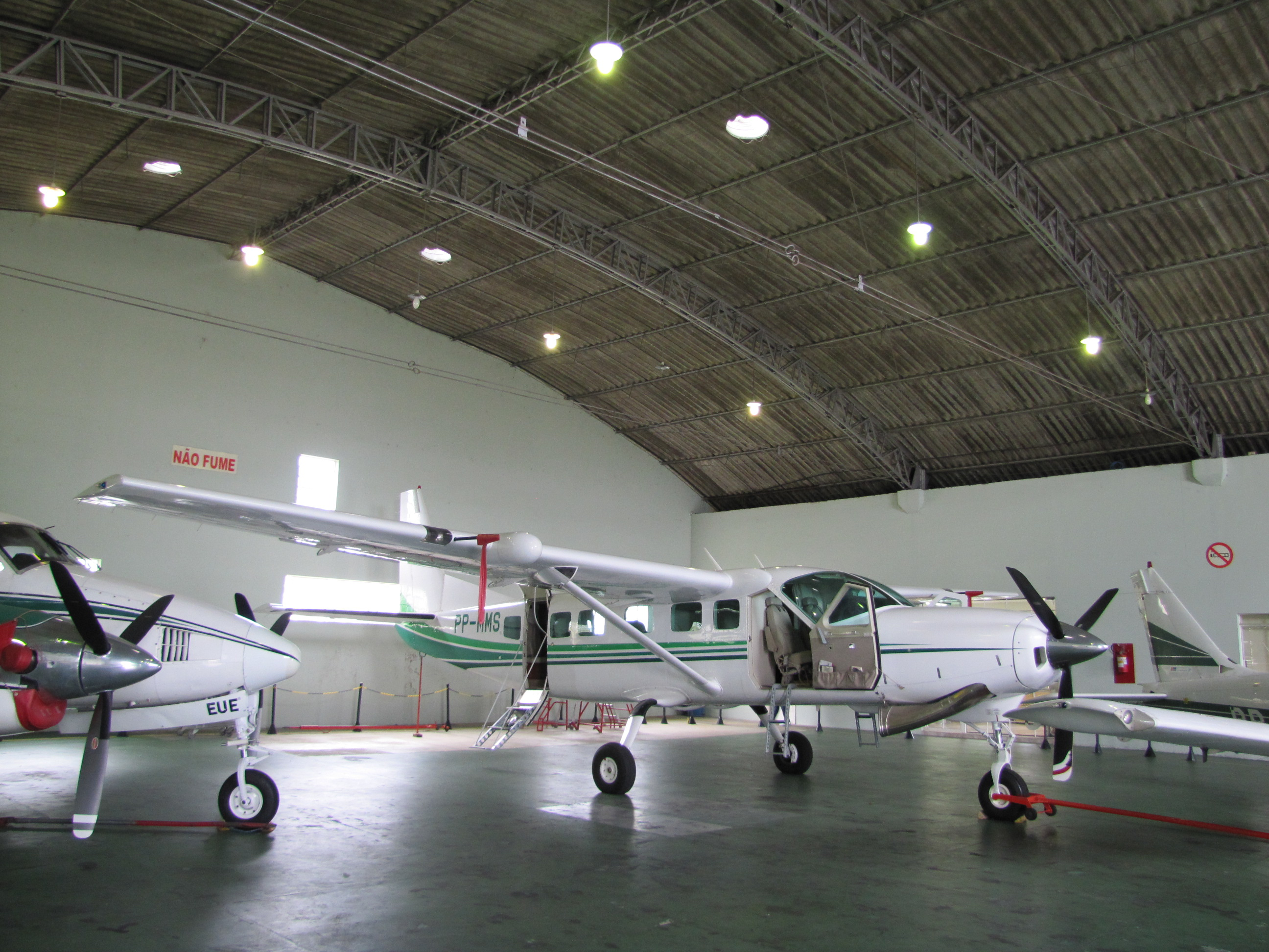 Aeronave da Seção de Transporte Aéreo do Paraná.